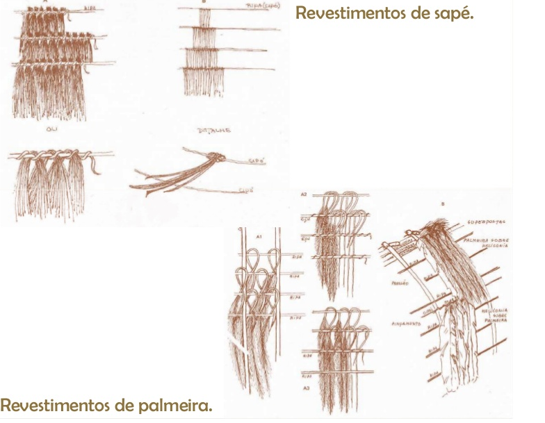 Revestimento de palmeira indigena